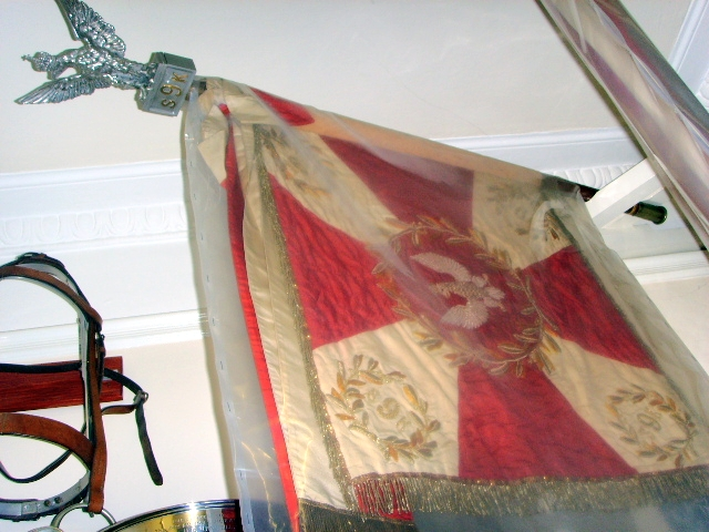 Eksponaty Instytutu im. Sikorskiego w Londynie. Sztandar 9 pułku strzelców konnych